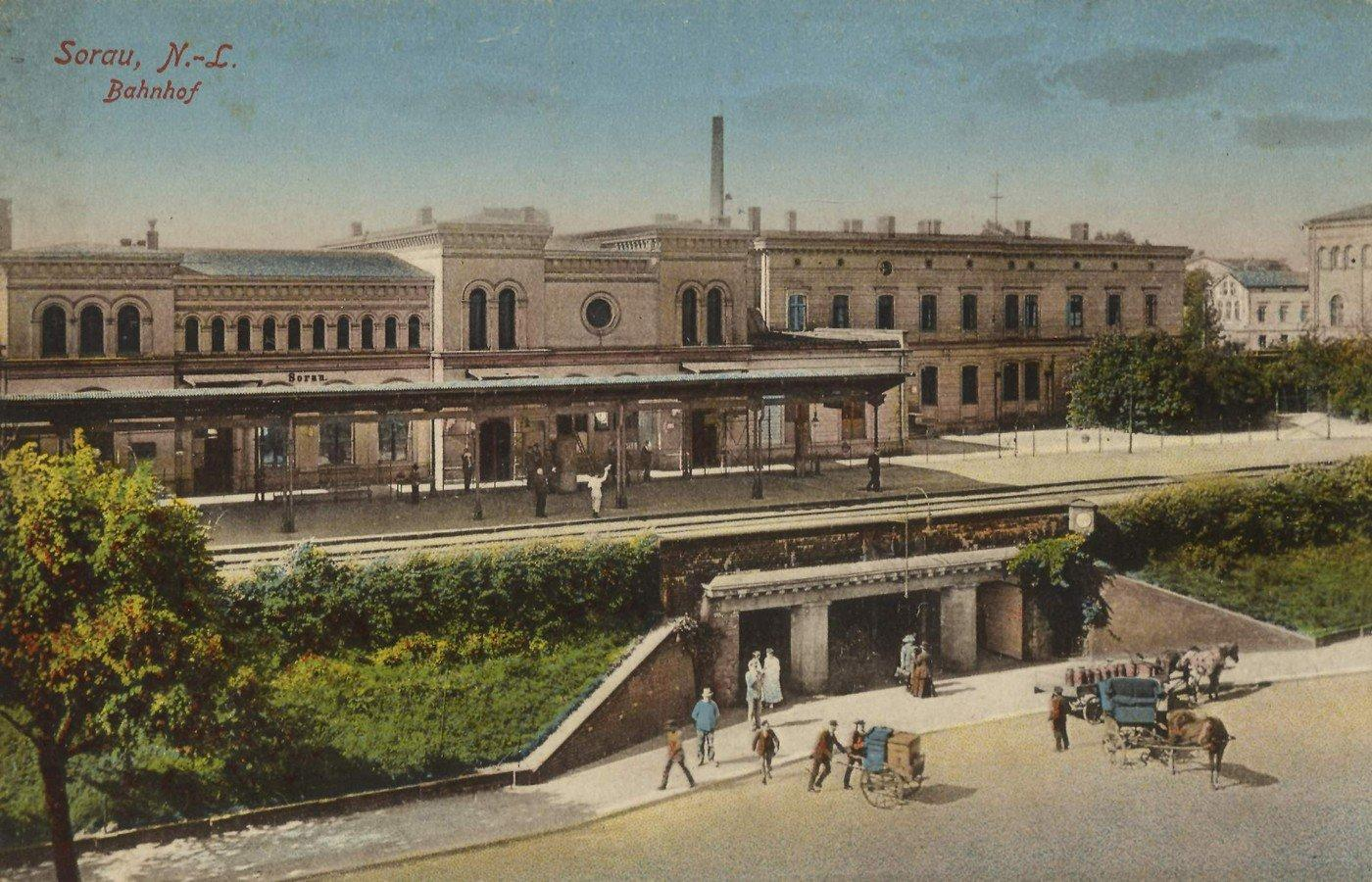 Dworzec kolejowy w Żarach.